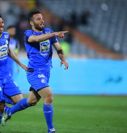 User created page with UploadWizard